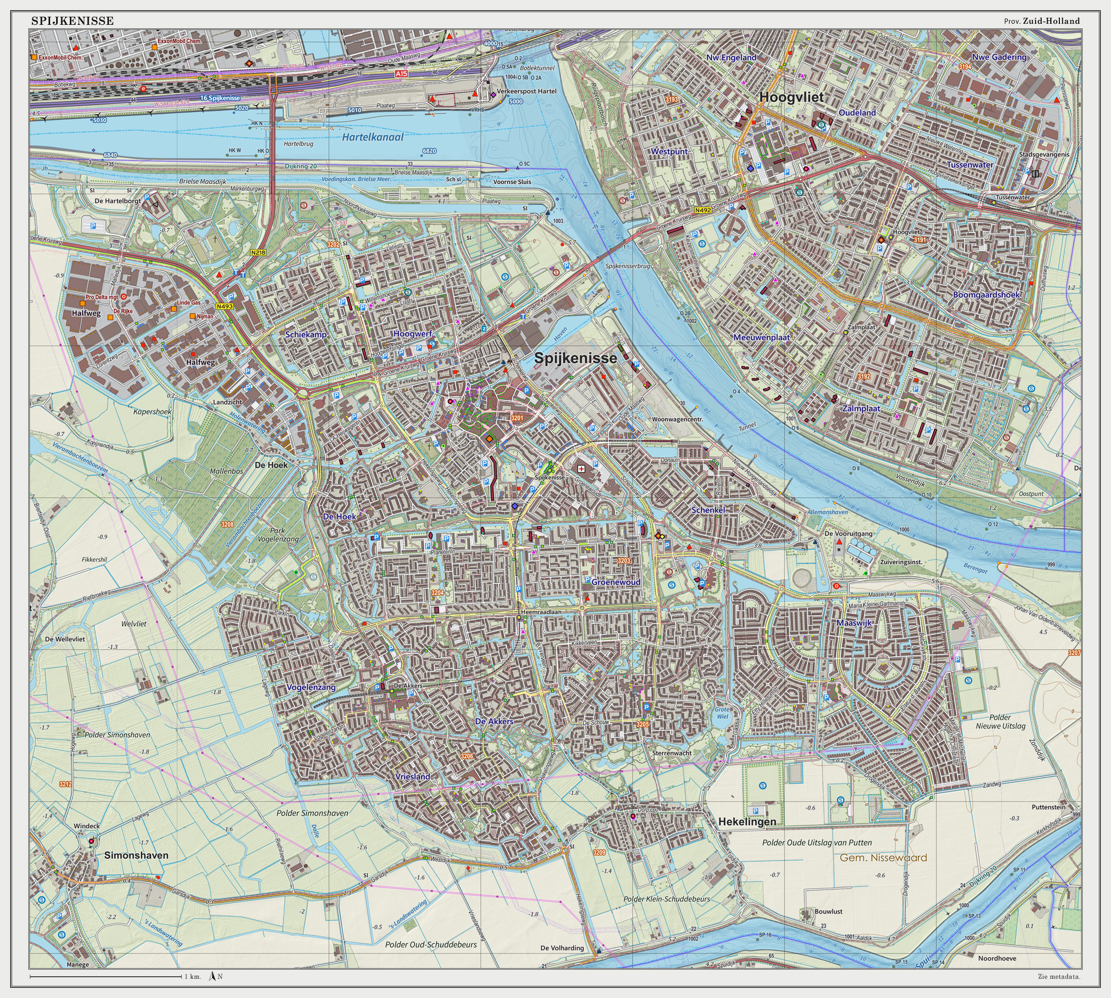 Topografische kaart van Spijkenisse (woonplaats). Resolutie: 300 pixels/km. Kaartbeeld samengesteld uit de open geodata van de Top10NL en Top25namen (Basisregistratie Topografie, Kadaster), Creative Commons BY licentie. Gebouwvlakken uit open geodata BAG extract. Wegen uit de OpenStreetMap. Reliëfschaduw uit de Actuele Hoogtekaart AHN2. Samenstelling en kleurenschema: Jan-Willem van Aalst, met QGIS2. Zie ook de Legenda.